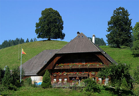 Bauernhof im Gohltal bei Stadelweid (Emmental)